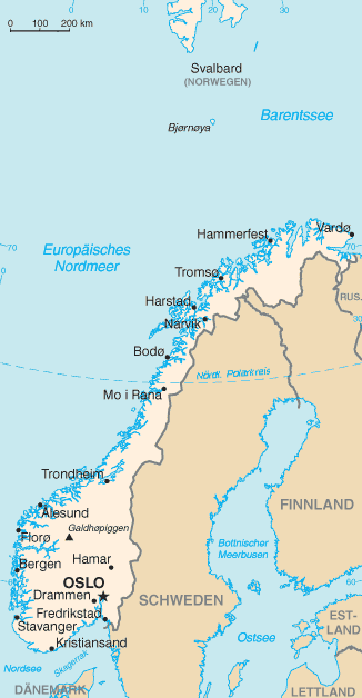 Karte von Norwegen